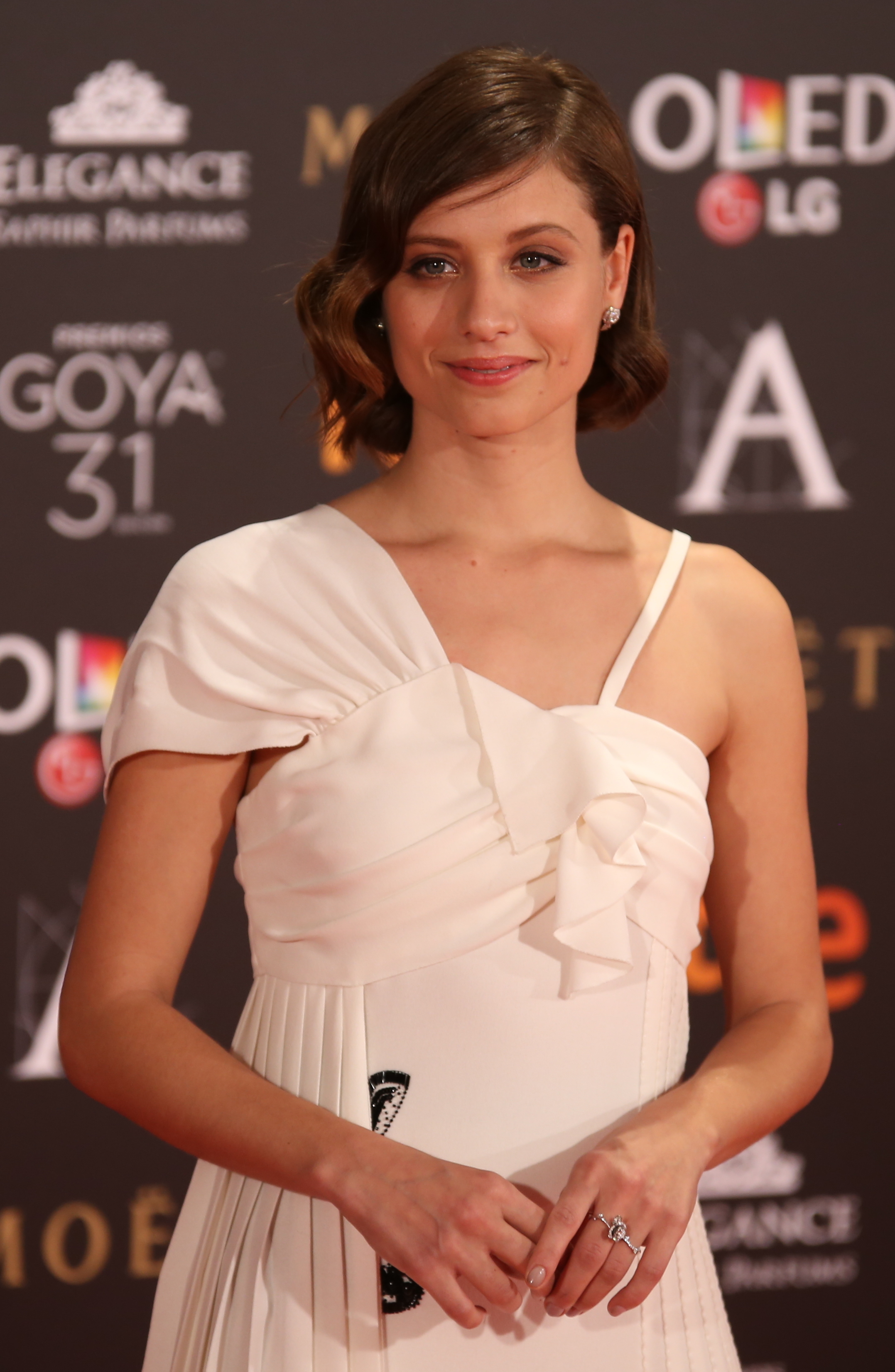 Premios Goya 2017